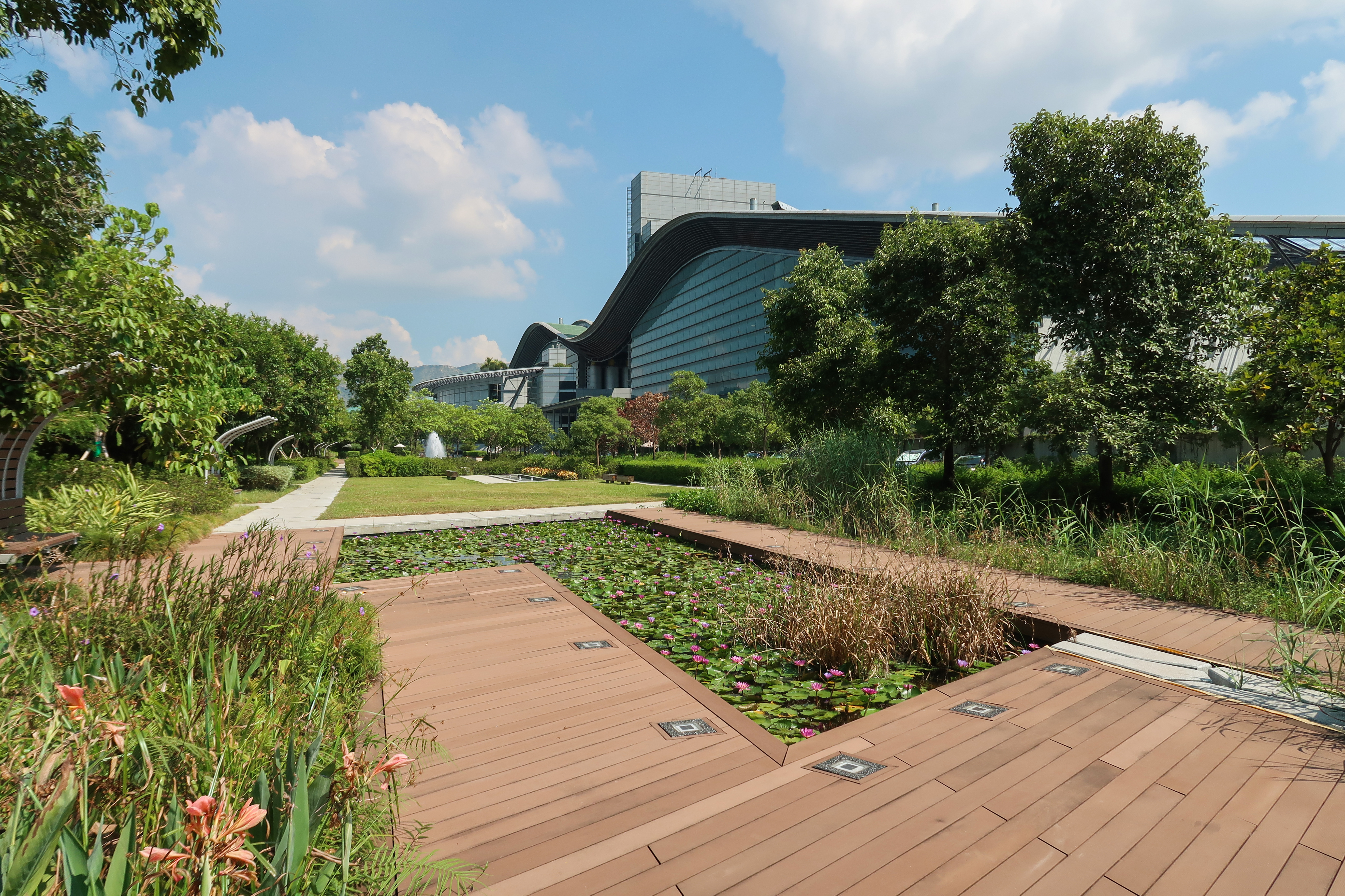 T Park